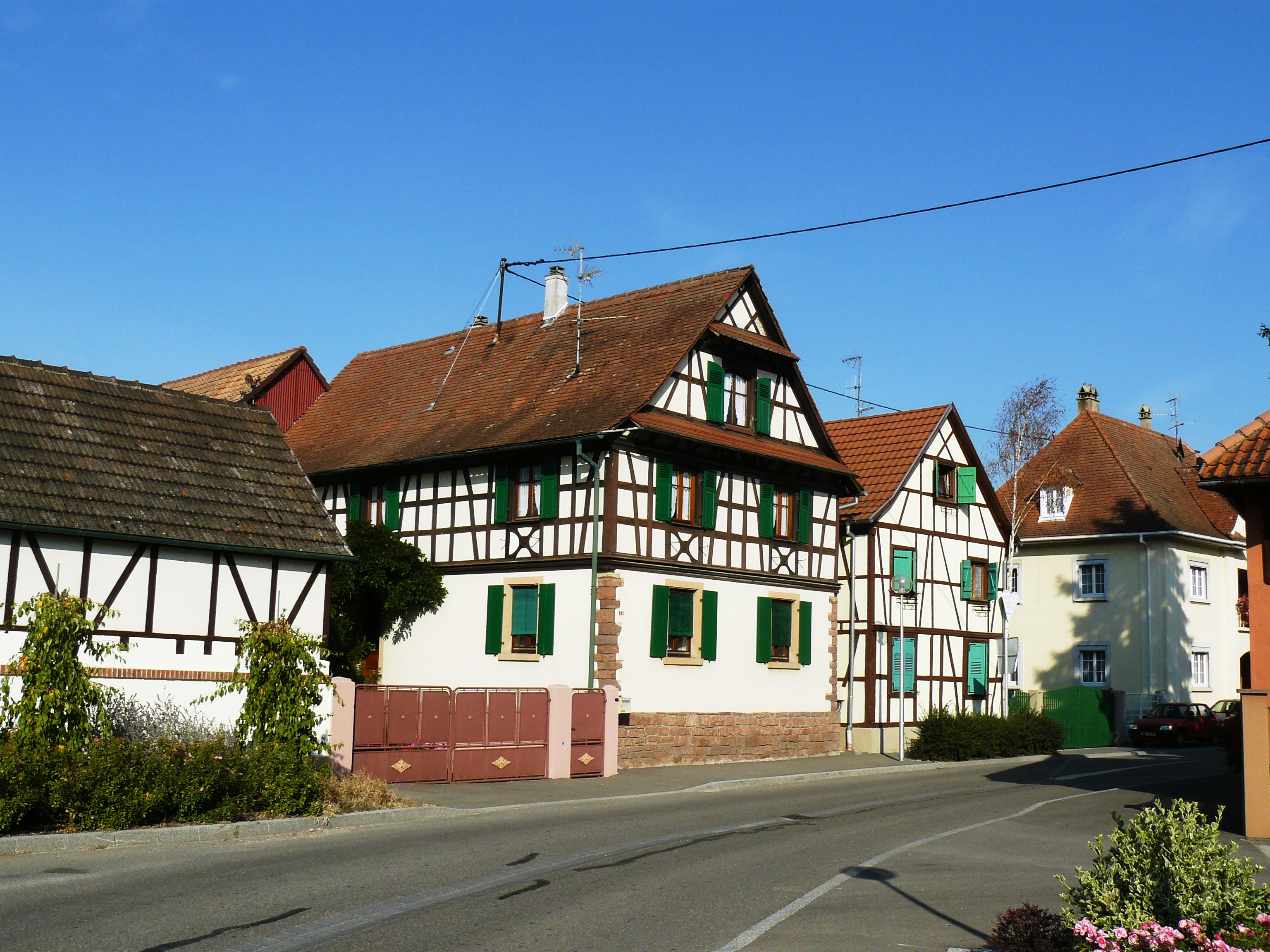 Maisons à colombages